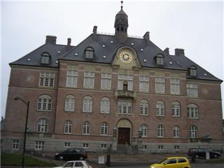 Byret Århus